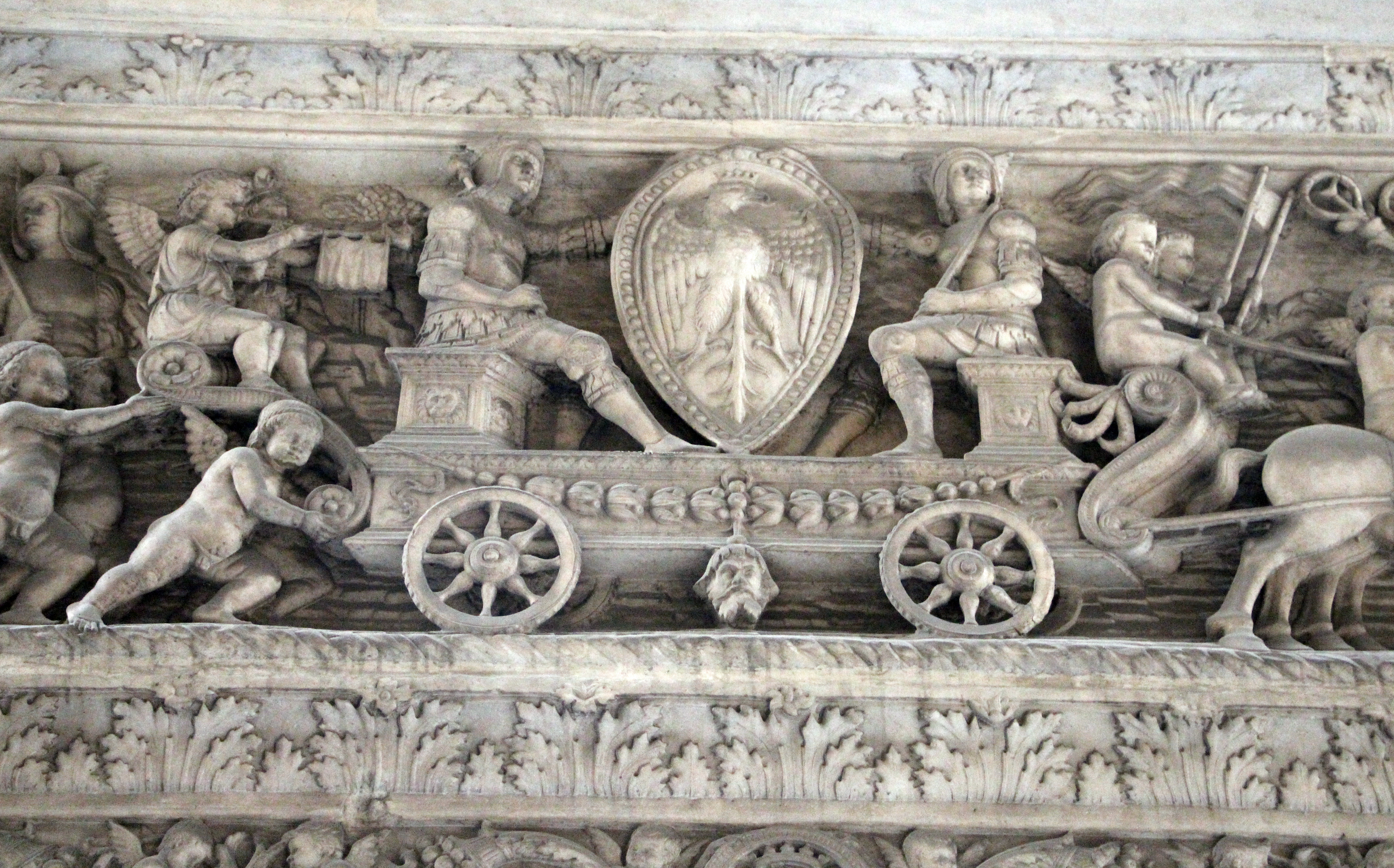 Genova, varie